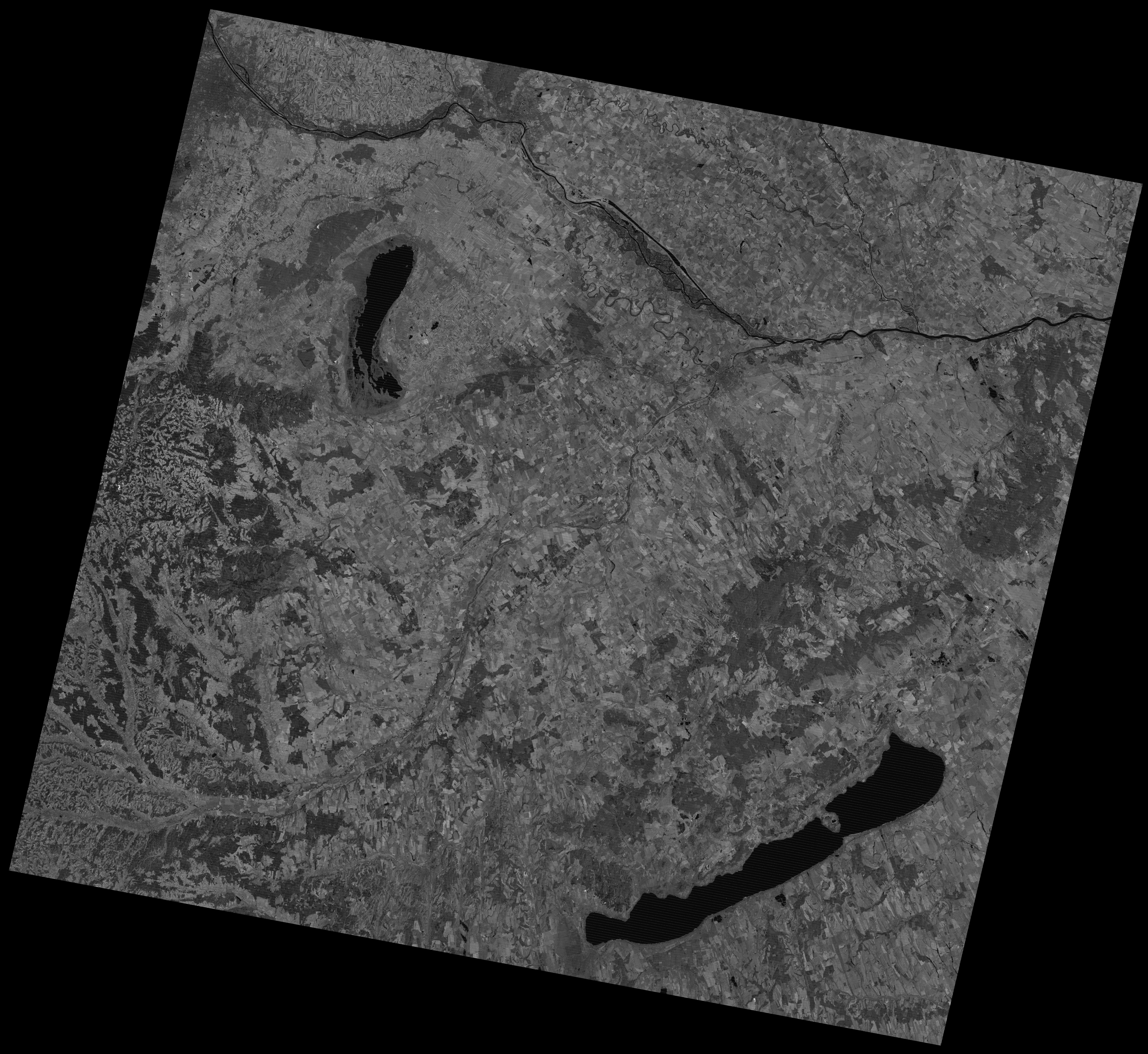 A Landsat-5 felvétele az Észak-Dunántúlról a közép infravörös (5-ös) sávban